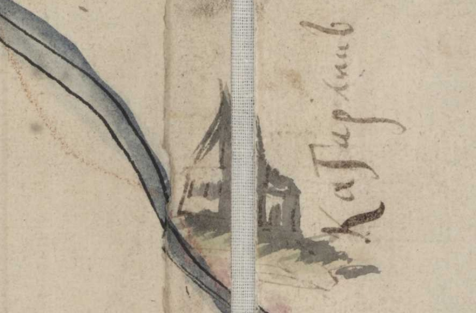 Фрагмент карти Київської губернії. XVIII століття. РГАДА, ф. 192, оп. 1, Киевская губ., № 5.